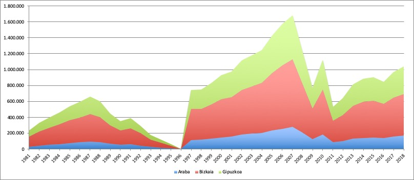 Elaboración propia